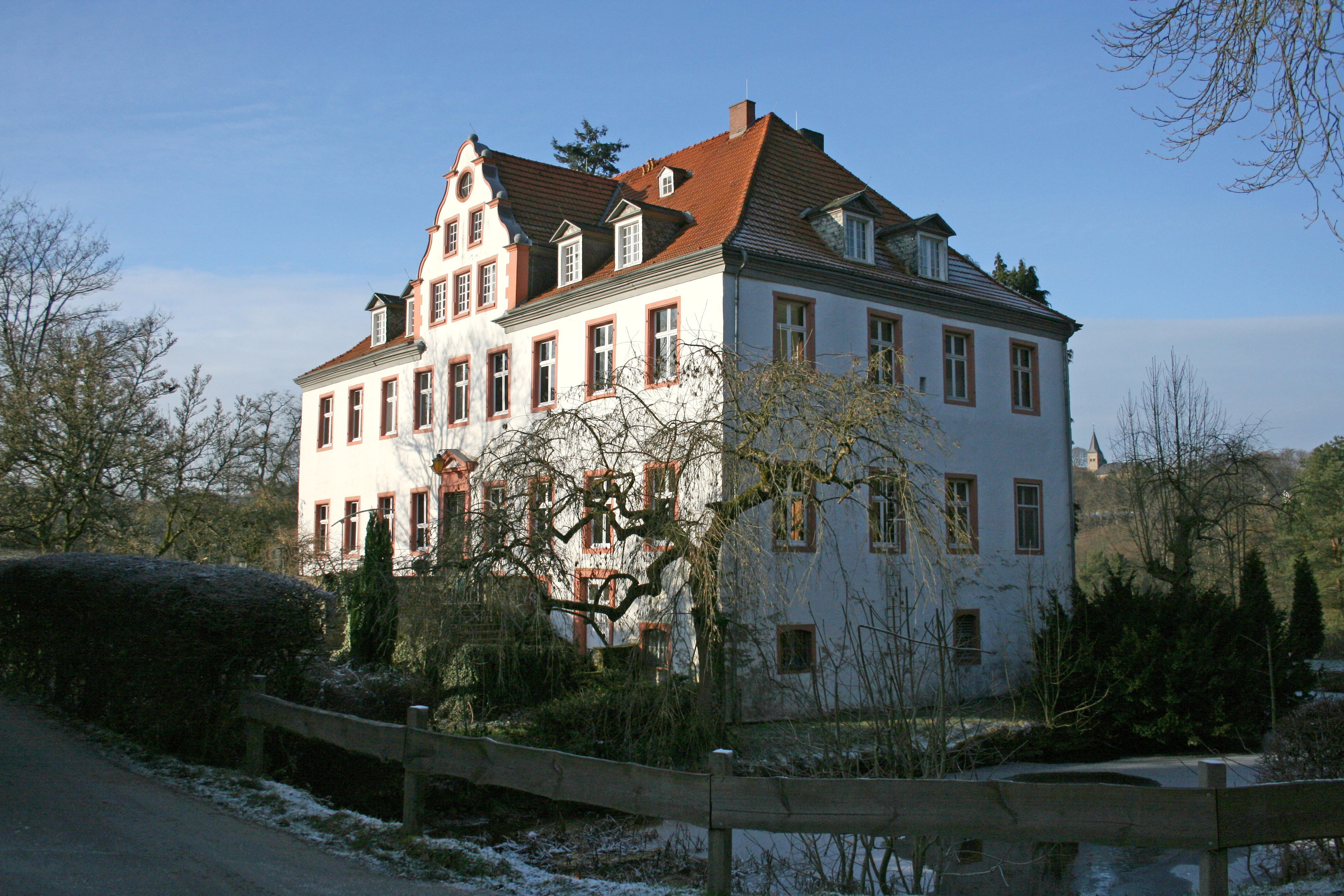 Schloss Georghausen in Lindlar